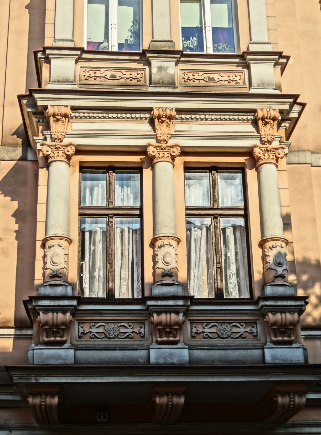 Kamienica przy ul. Cieszkowskiego – Pomorska 48 w Bydgoszczy (1895-1896, Józef Święcicki)